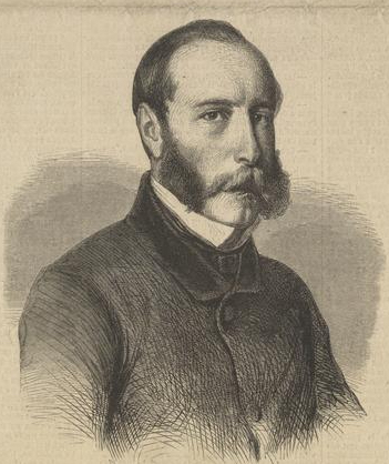 Albert de Pourtalès, ambassadeur de Prusse en France